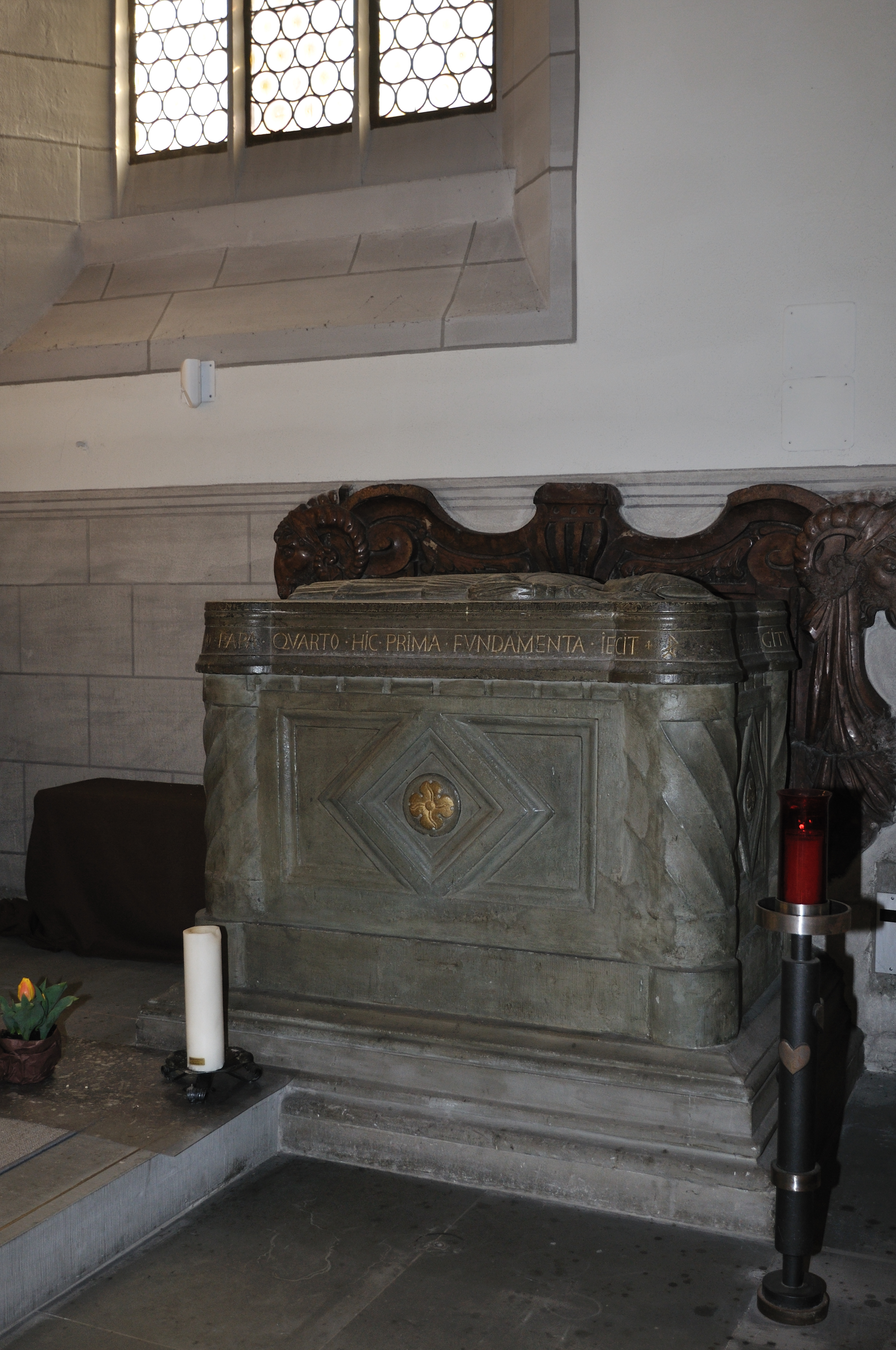 Sarkophag des Heiligen Radolf im Münster Unserer Lieben Frau in Radolfzell, 1538